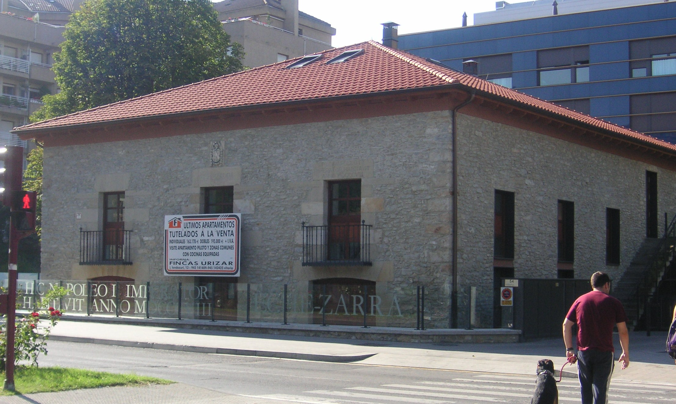 Casa de Etxezarra, Vitoria-Gasteiz, País Vasco